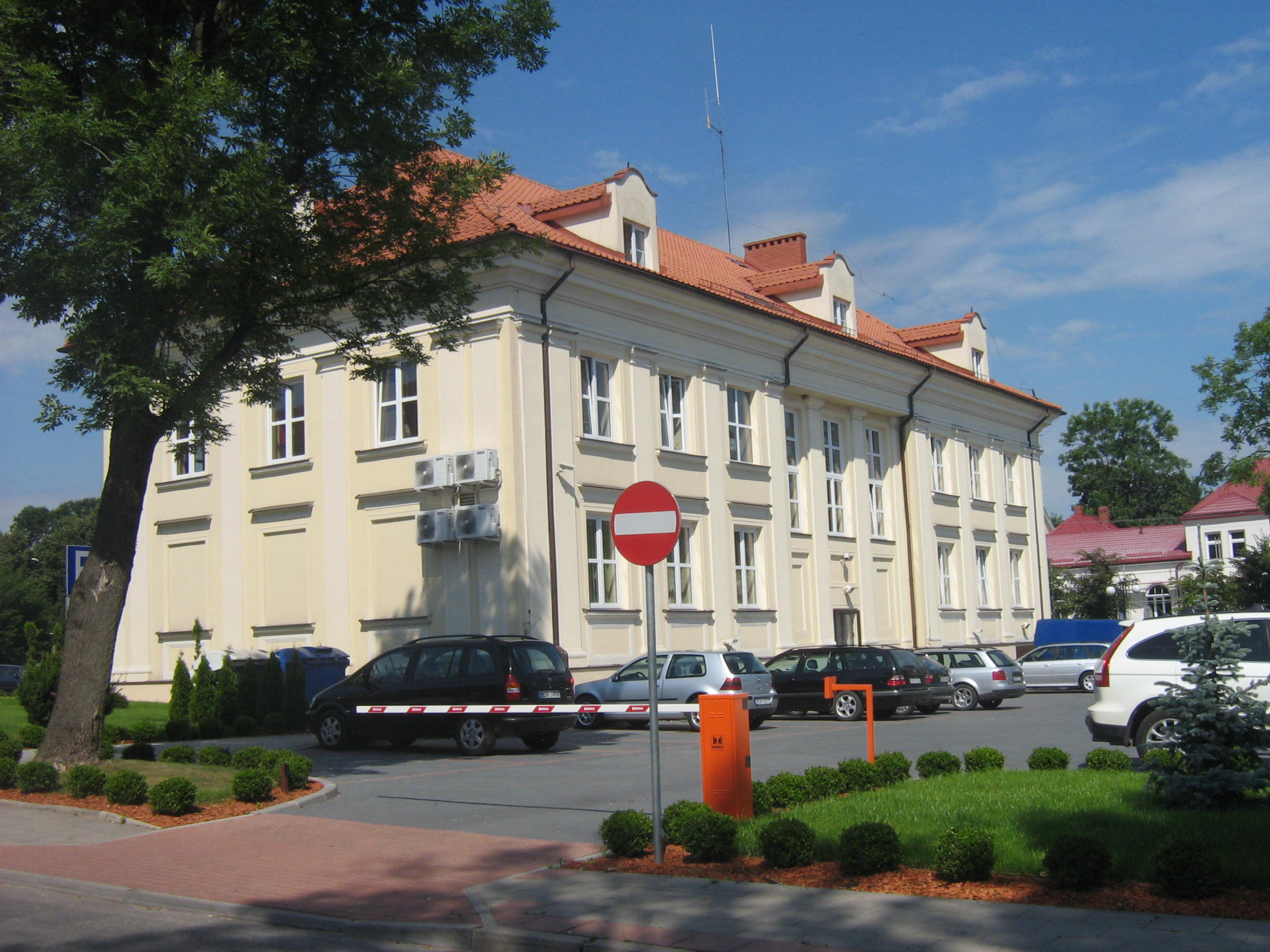 Ratusz w Sokółce.